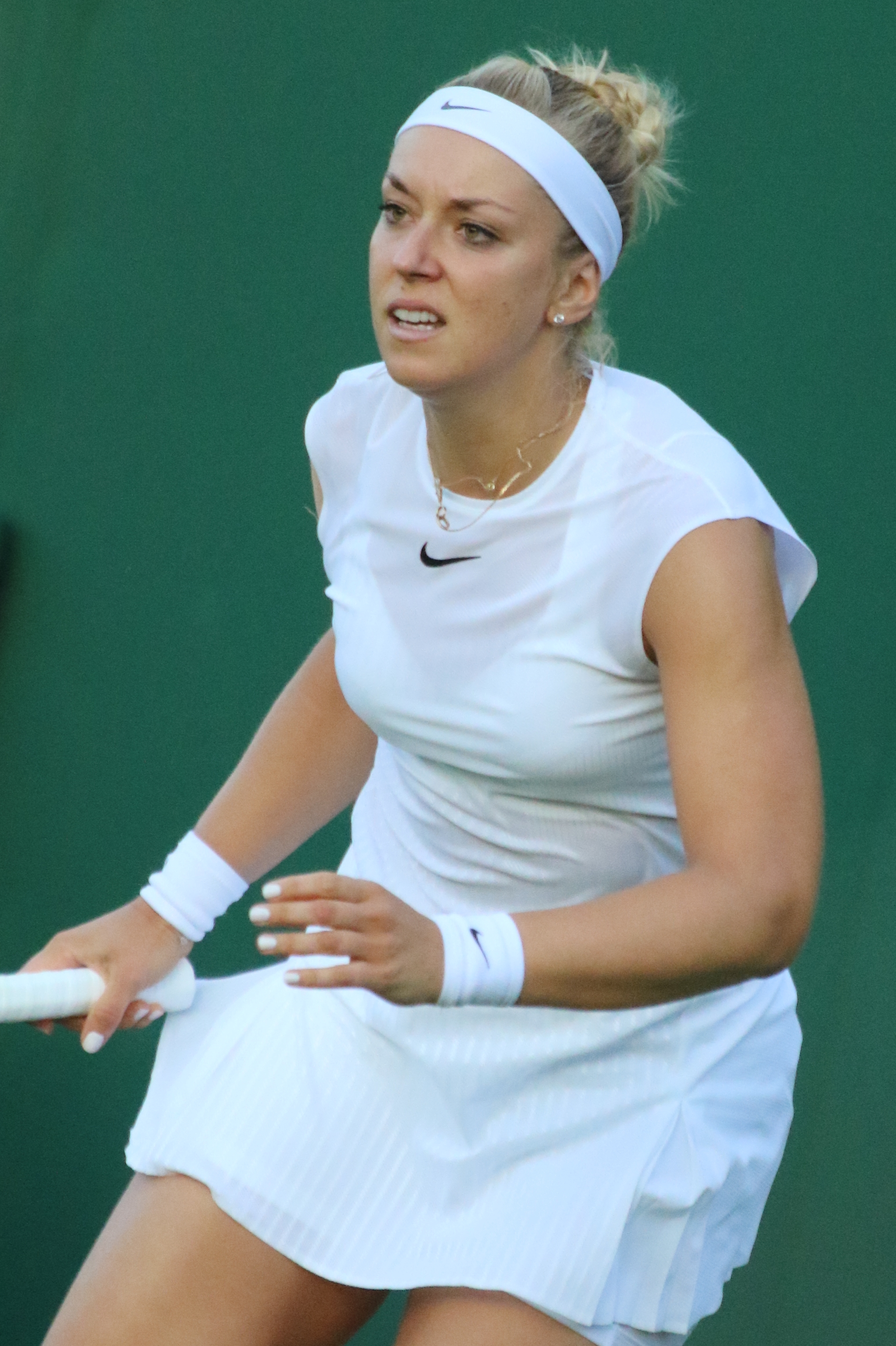 Lisicki WM17 (10)